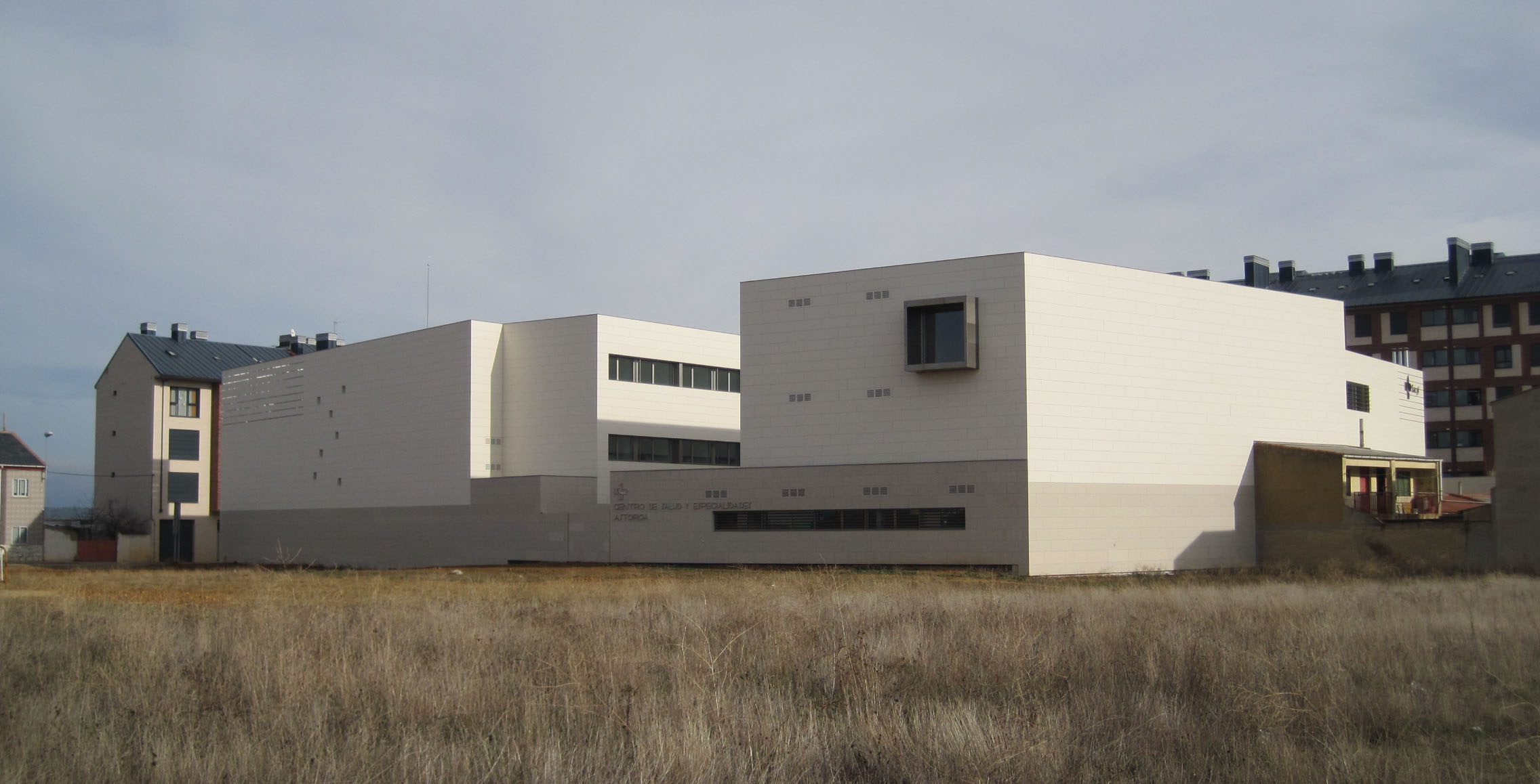 Nuevo centro de salud en Astorga (León, España).